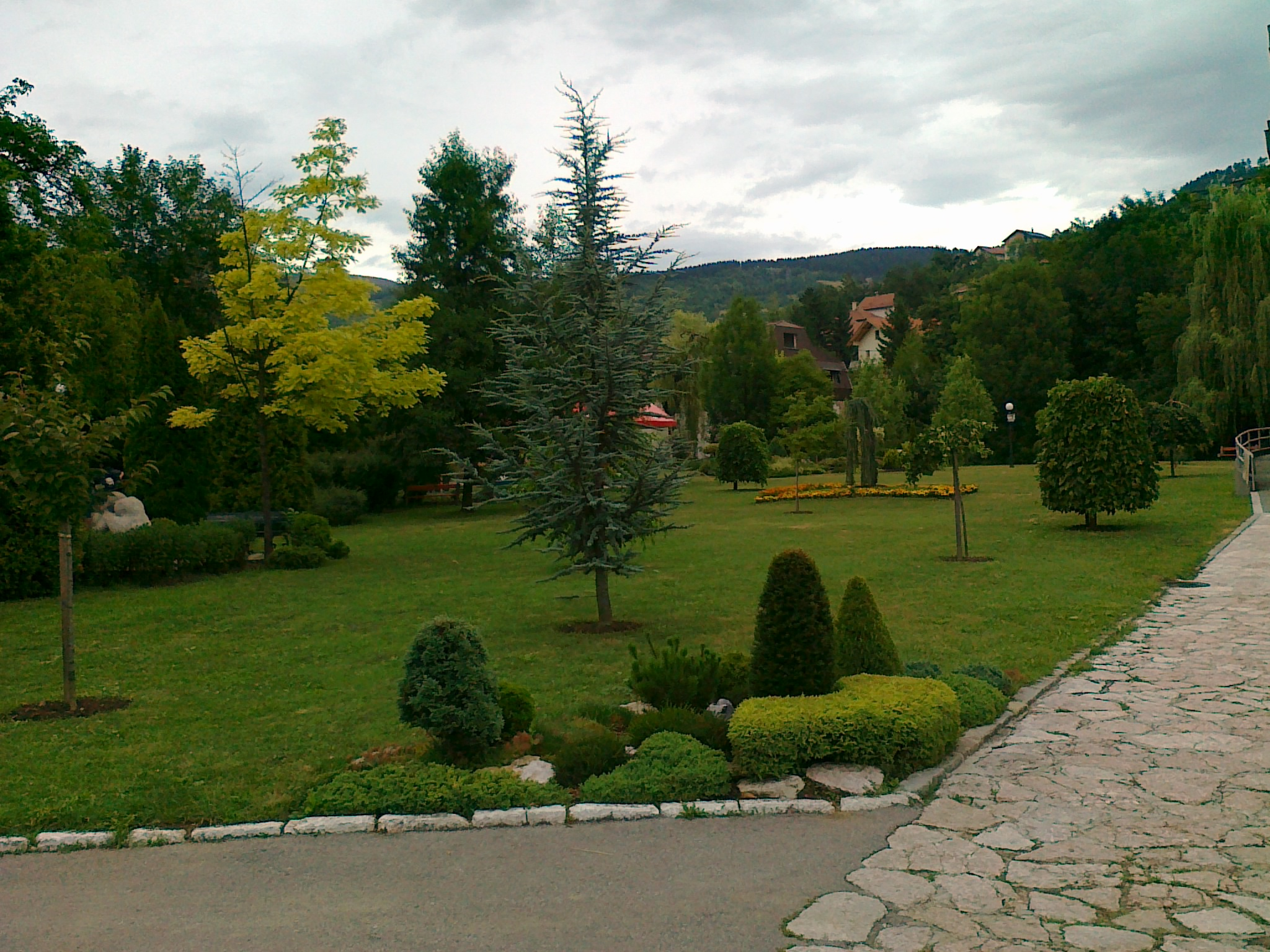 Pionirska dolina